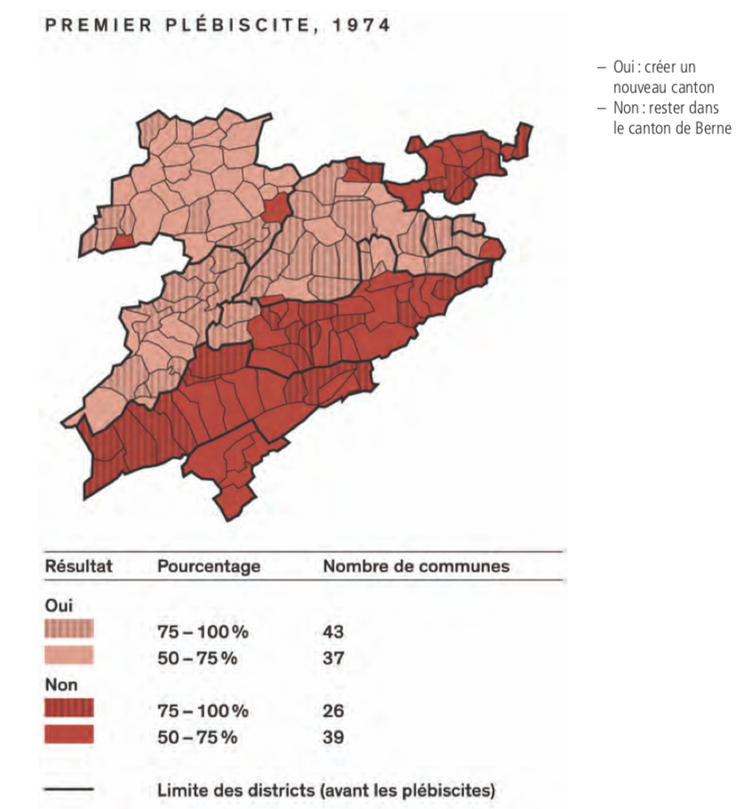 Résultat du premier plébiscite du 23 juin 1974.